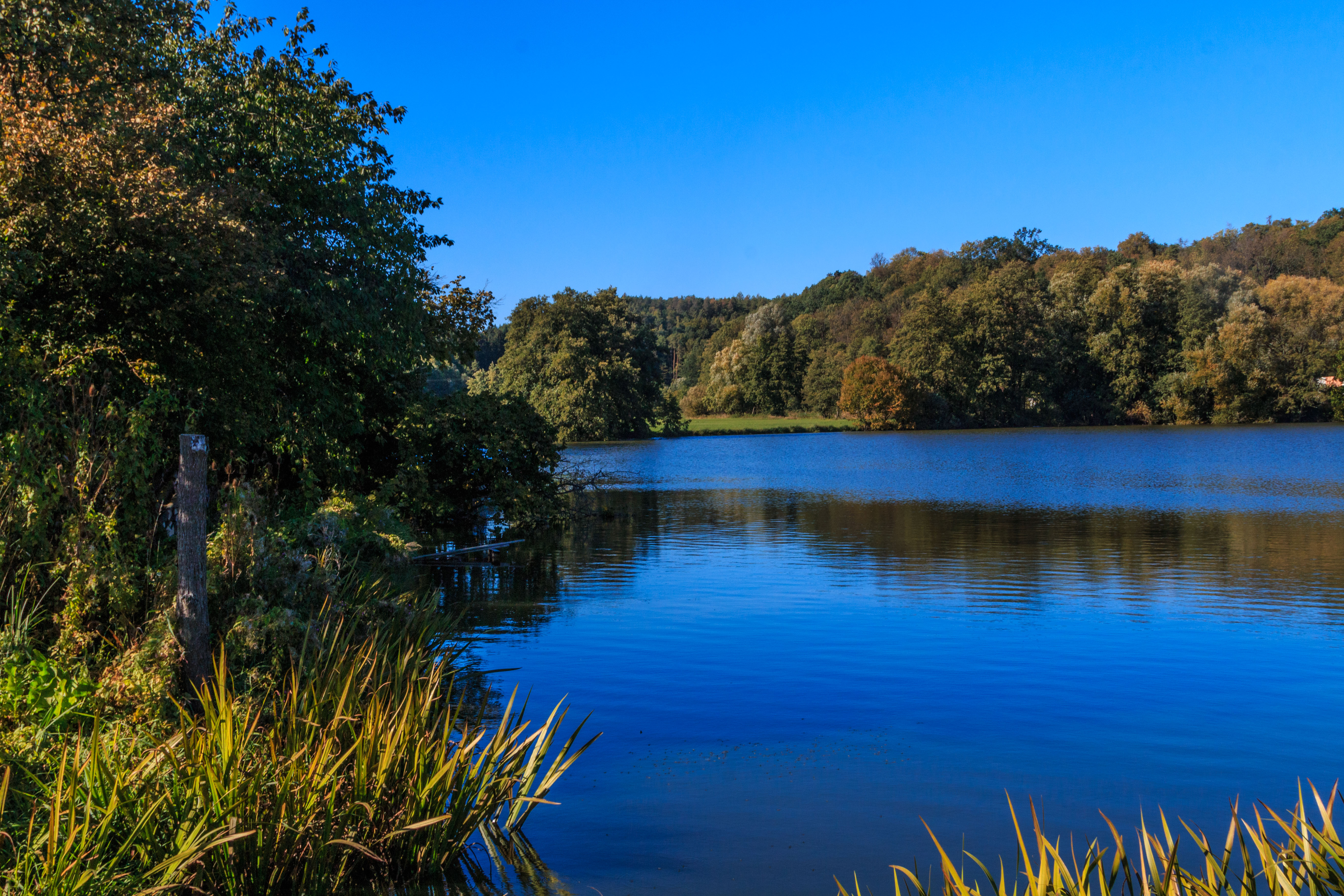 Rybník Komorník u Střehomi Project: Vodstvo.